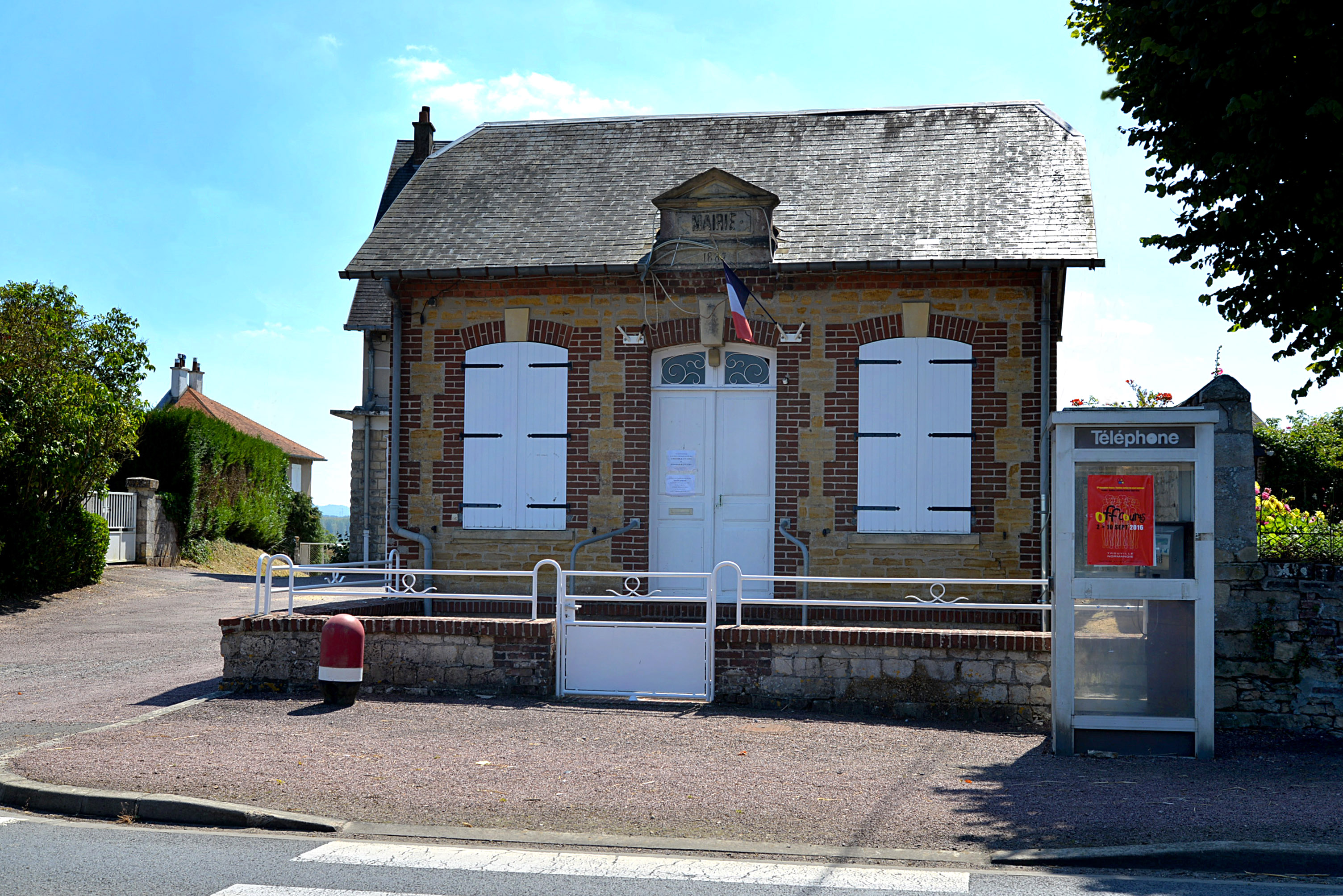 Goustranville (Calvados)